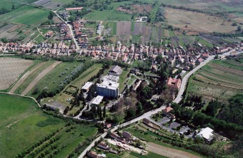 Balf valamikori község felső részének a gyógyfürdő környéknek légifelvétele. A képen a településrész szinte minden látnivalója rajta van.